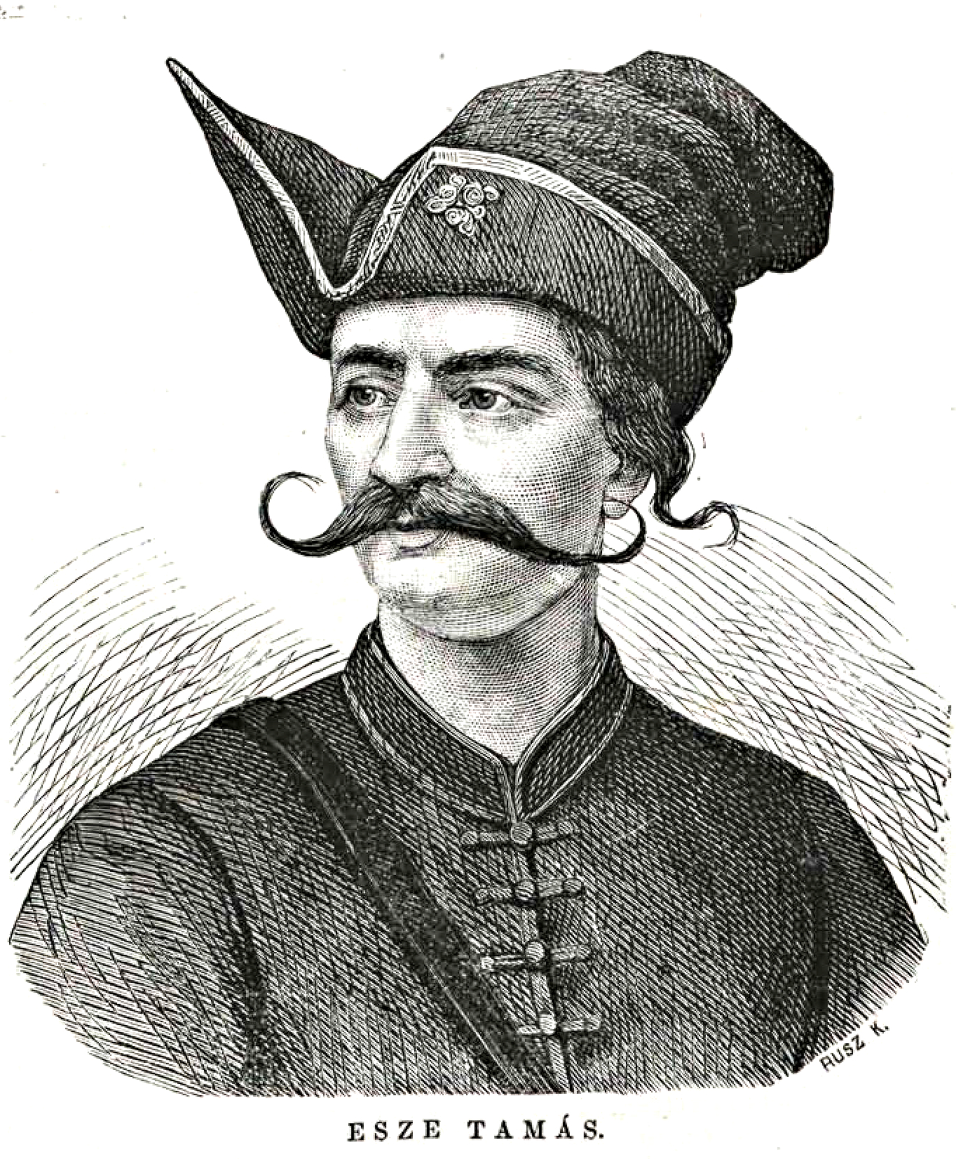 Porträt von Tamás Esze, der Stich wurde erstellt von Charles Rus.